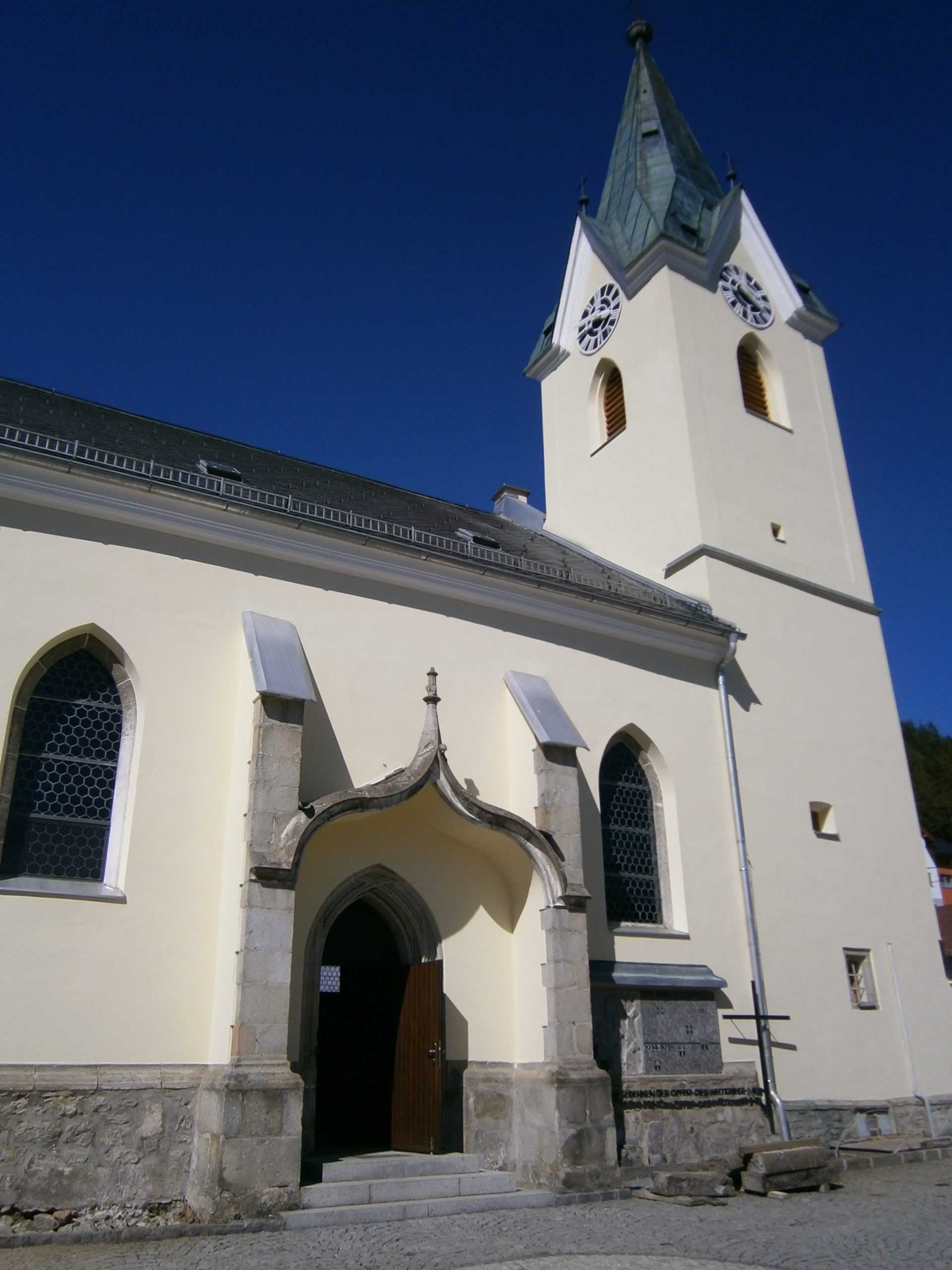 Object location48° 28′ 39.59″ N, 14° 43′ 41.92″ E